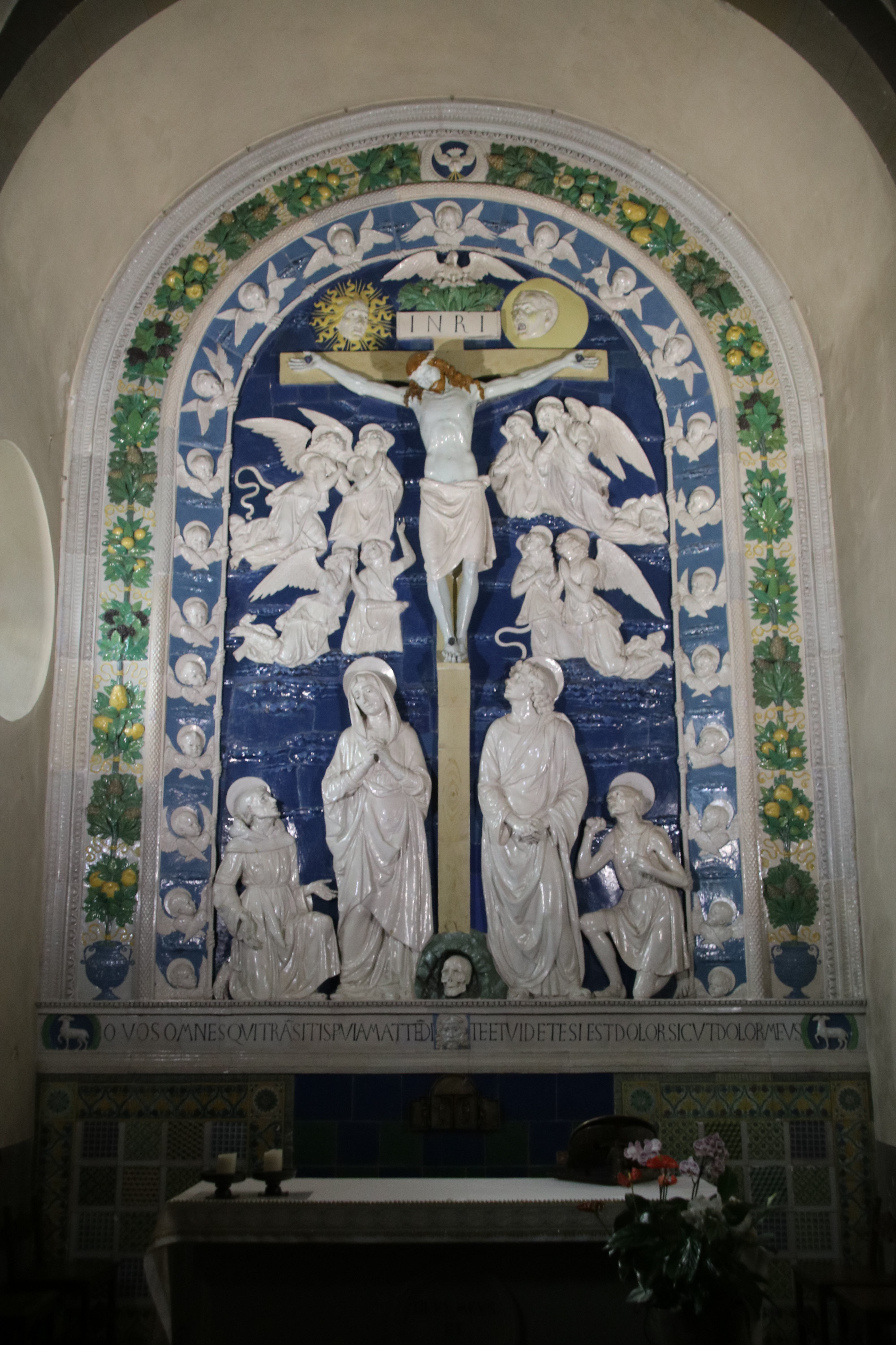 Andrea della Robbia, Crocifissione, 1481, Cappella delle Stimmate, Santuario della Verna